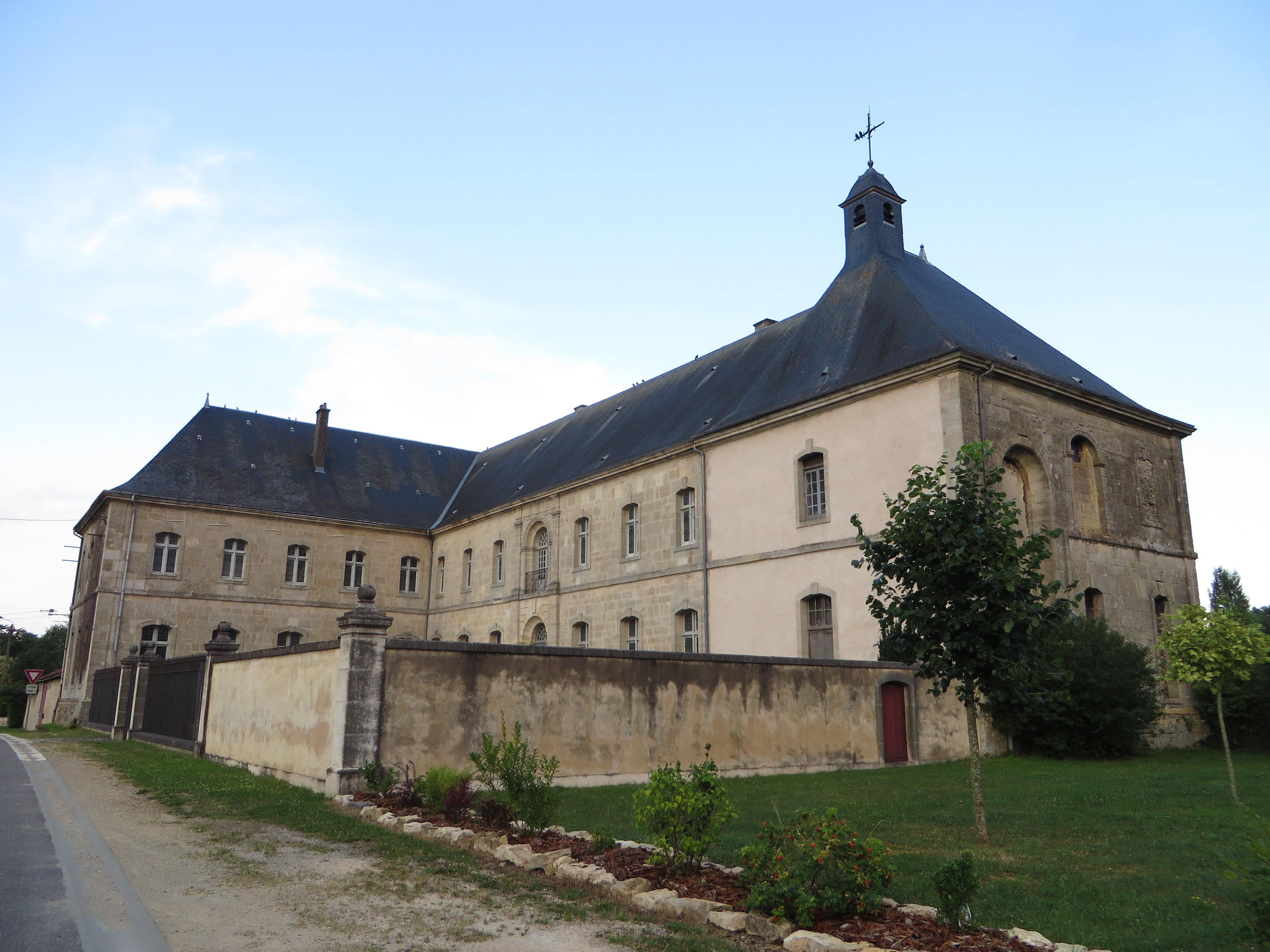 Brieulles-sur-Meuse abbaye des Prémontrés